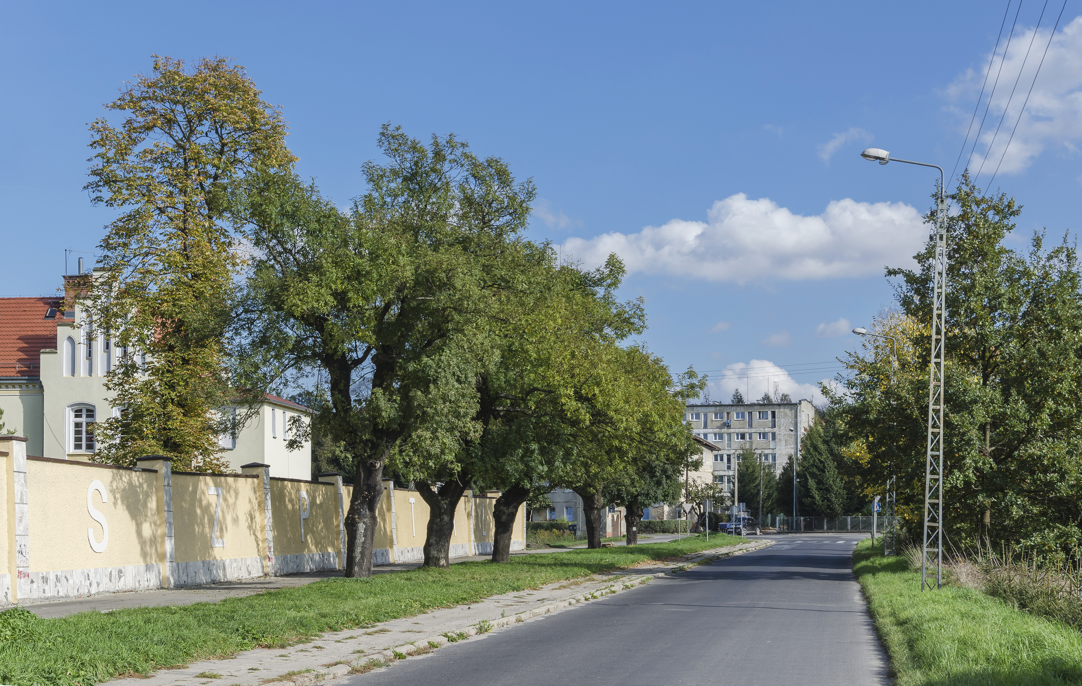 Kłodzko, ul. Szpitalna